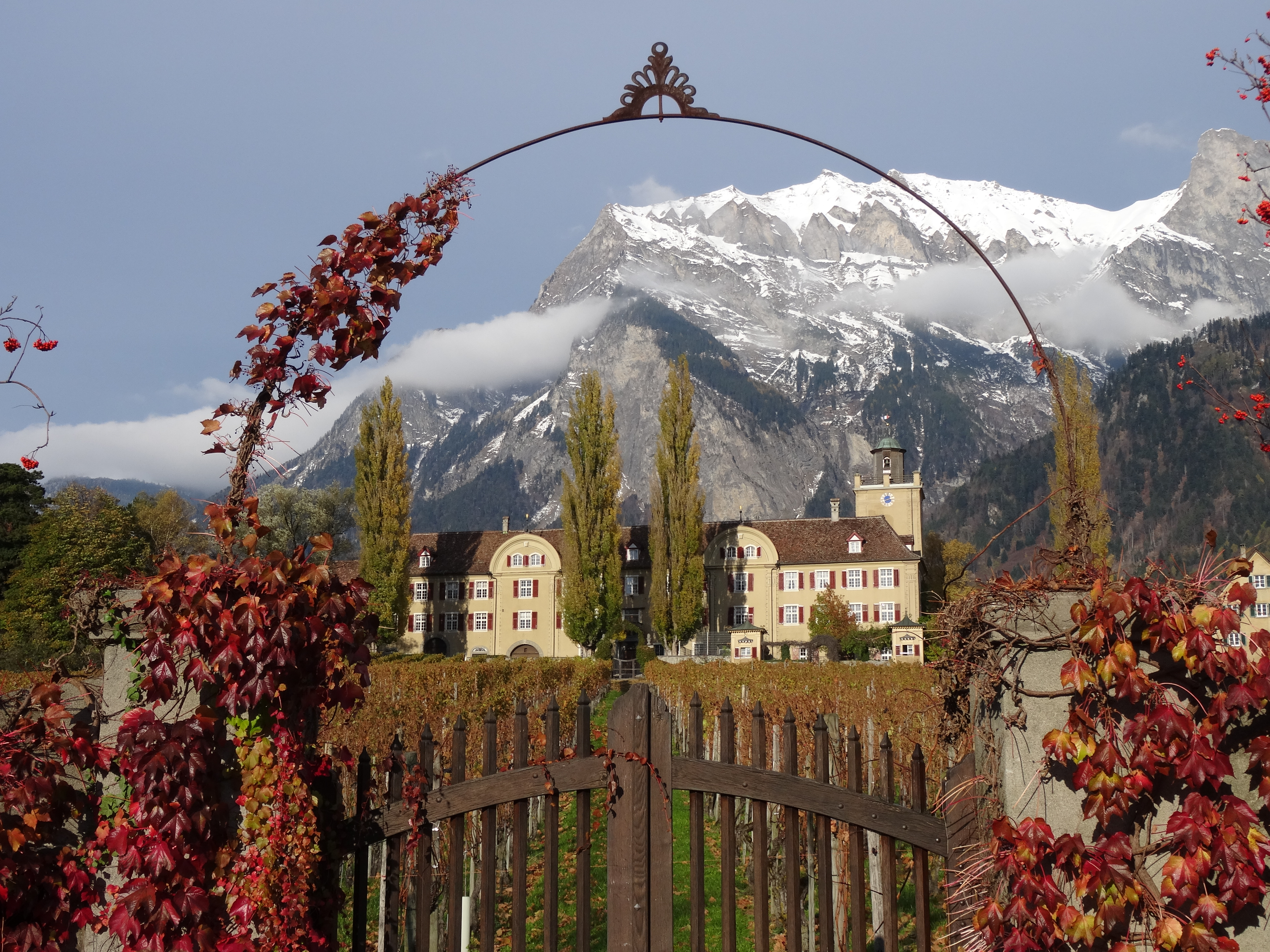 Schloss Salenegg Westseite